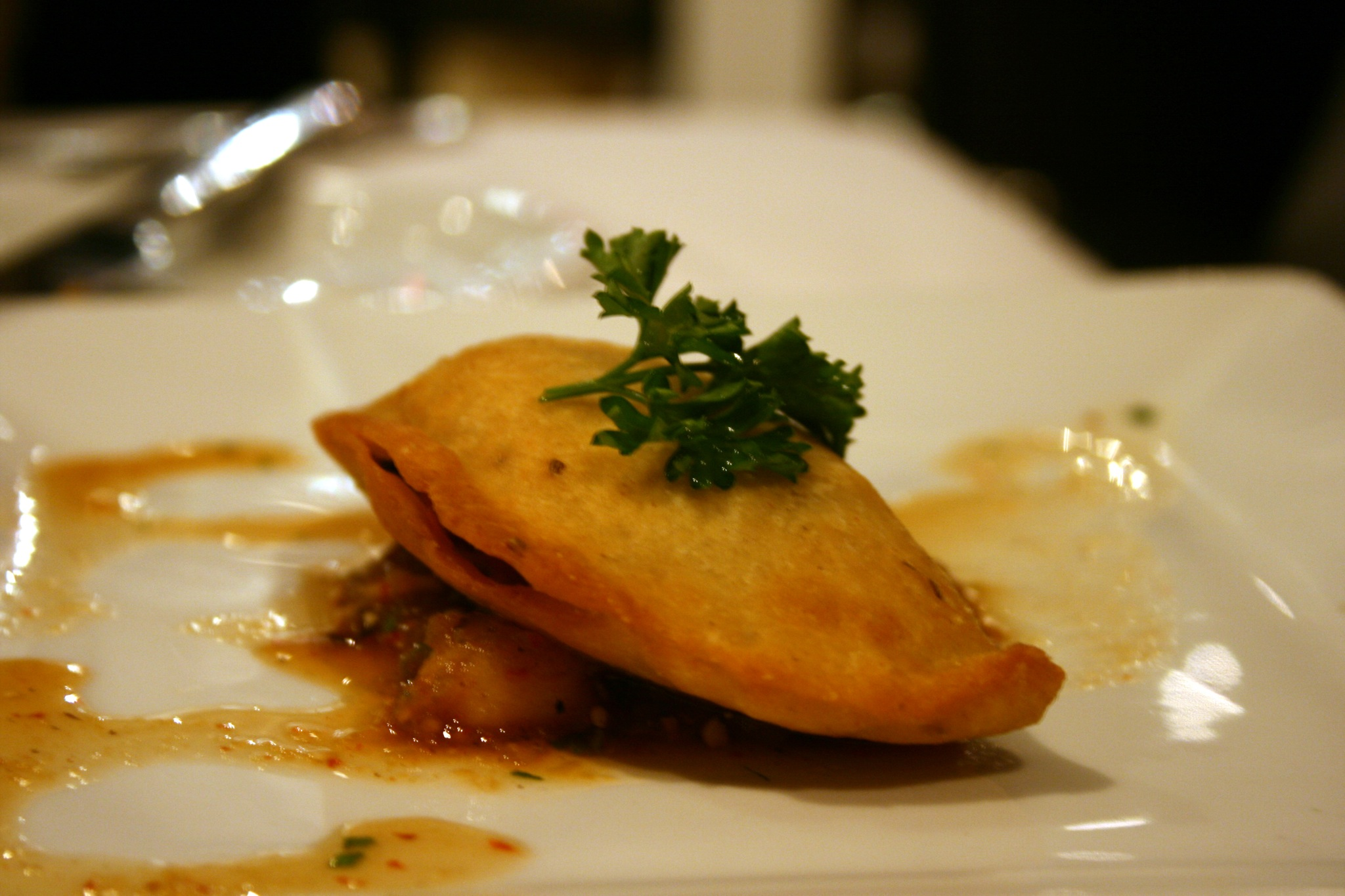 Vermilion 10 W Hubbard St